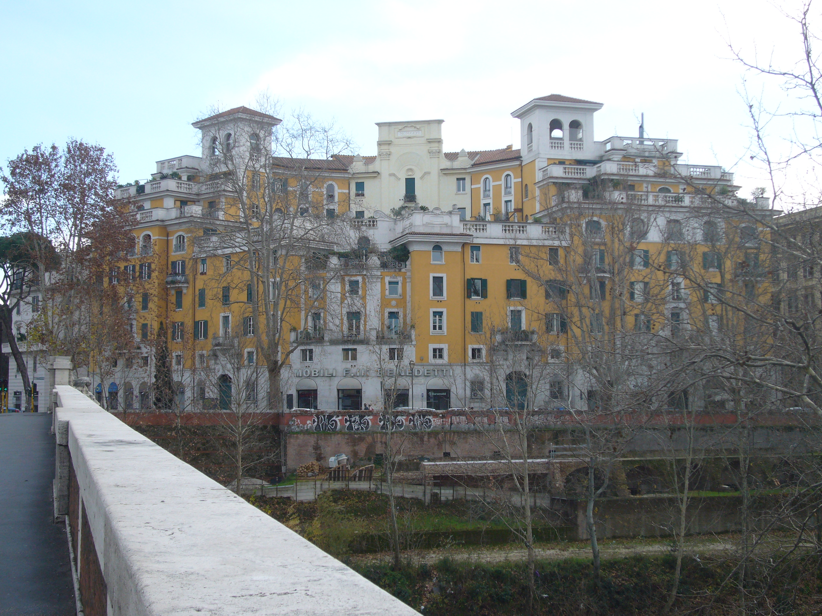 Roma, immobile da 96 appartamenti all'angolo tra via Marmorata e lungotevere Testaccio detto "Il Cremlino" (Carlo Broggi 1926)